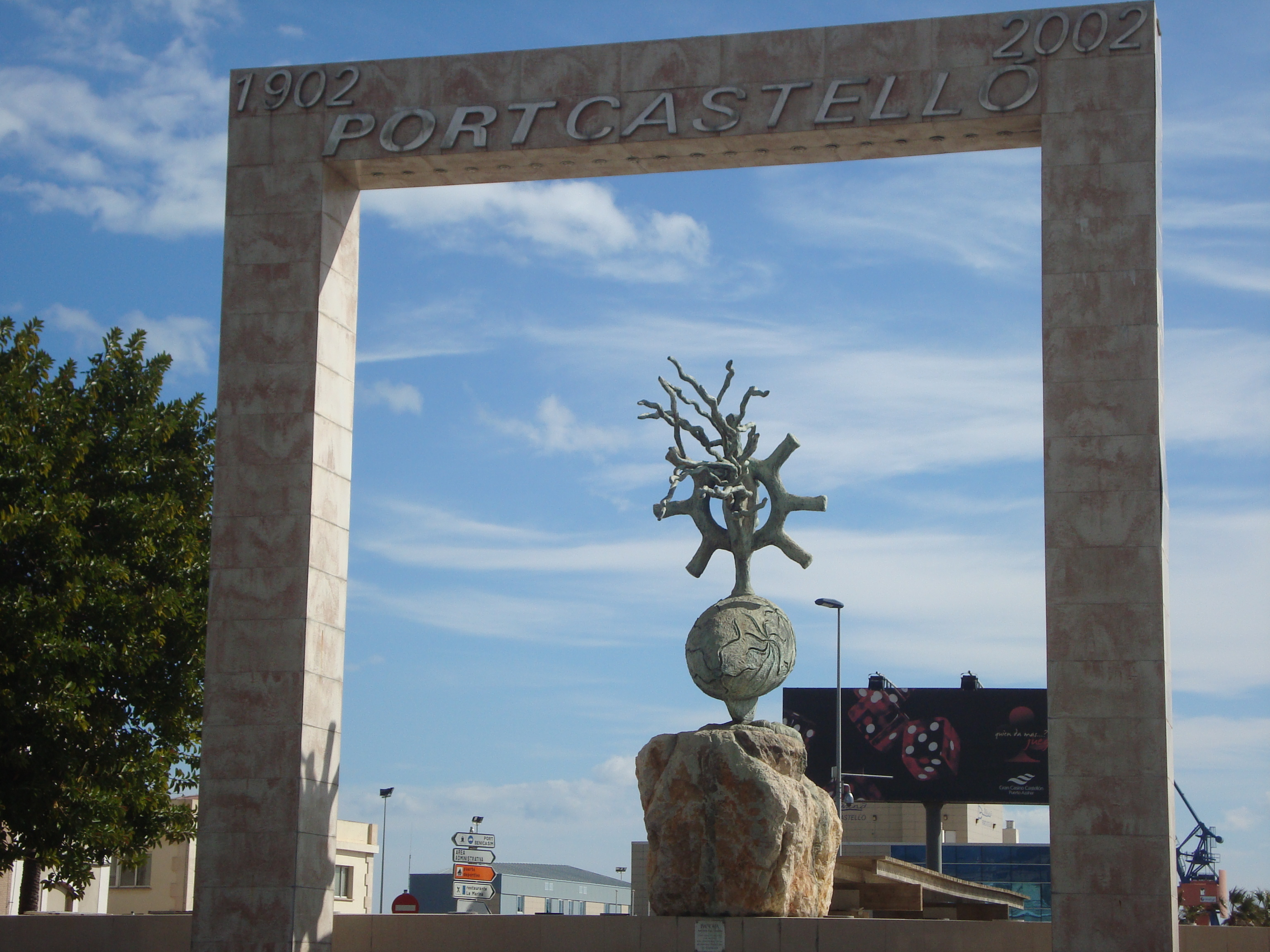 Puerto de Castellón